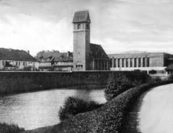 Здание кирхи Христа (разрушена в 1950-е). Находилась в районе начала современной улицы Горького.